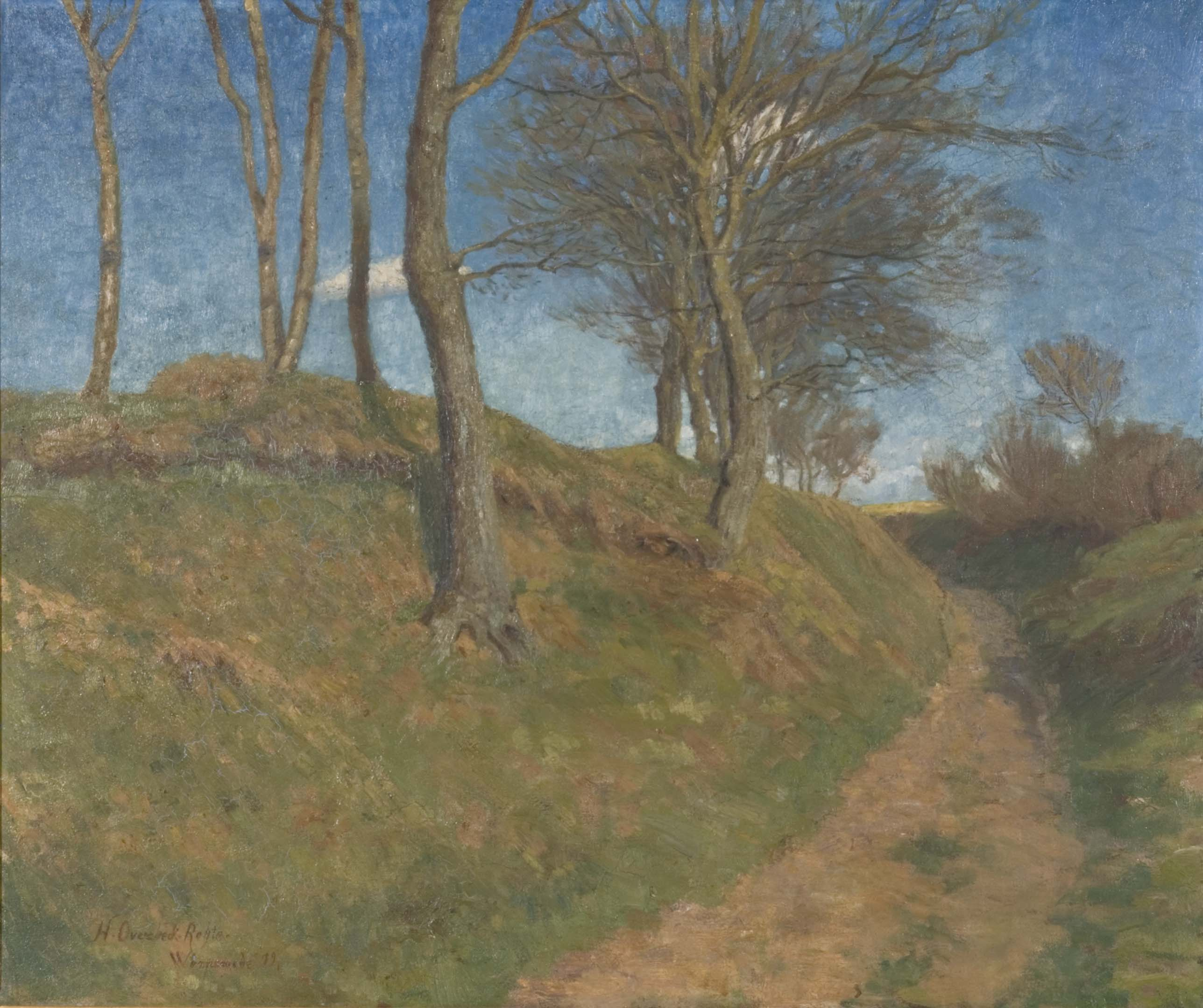 Hohlweg. Öl auf Leinwand, 78 × 92 cm